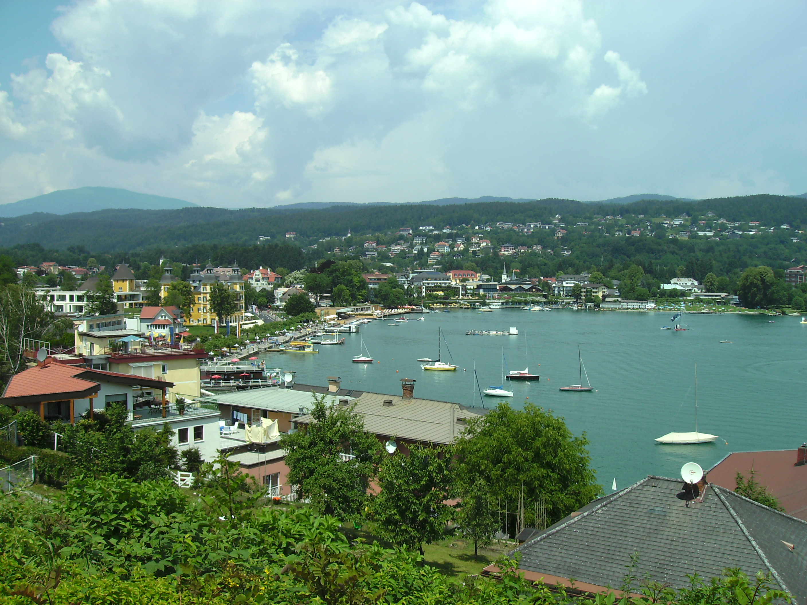 Veldener Bucht - Velden am Wörthersee